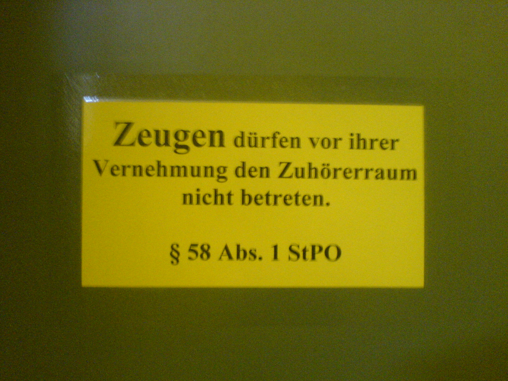 Strafjustizzentrum des Landgerichtes München I - Flur im 2. OG (Hinweisschild für Zeugen, § 58 Abs. 1 StPO)